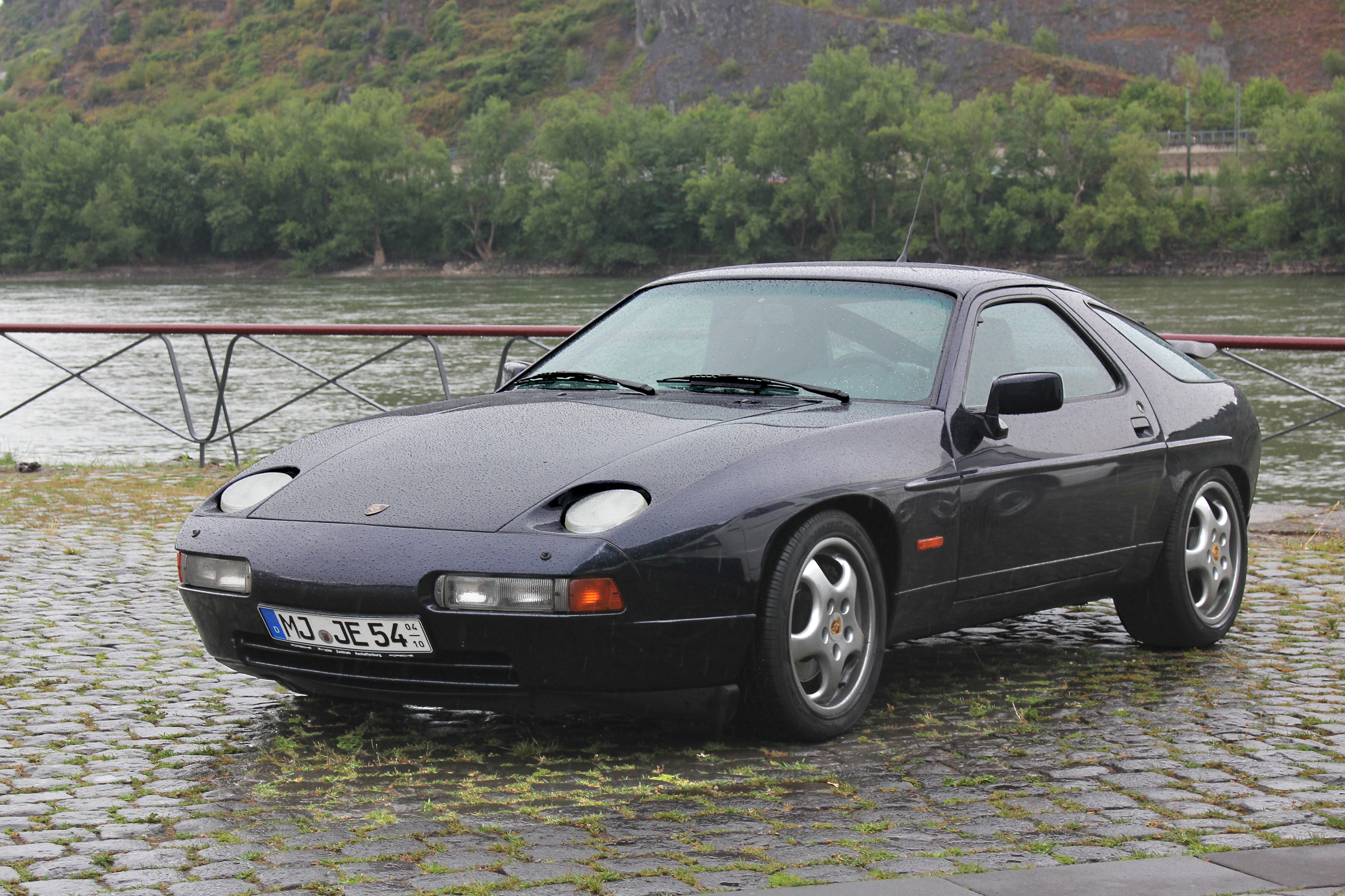 Porsche 928 GT, V8-Motor, 4957 cm³, 330 PS, Höchstgeschwindigkeit 275 km/h, Baujahr 1990 (Kennzeichen verändert)